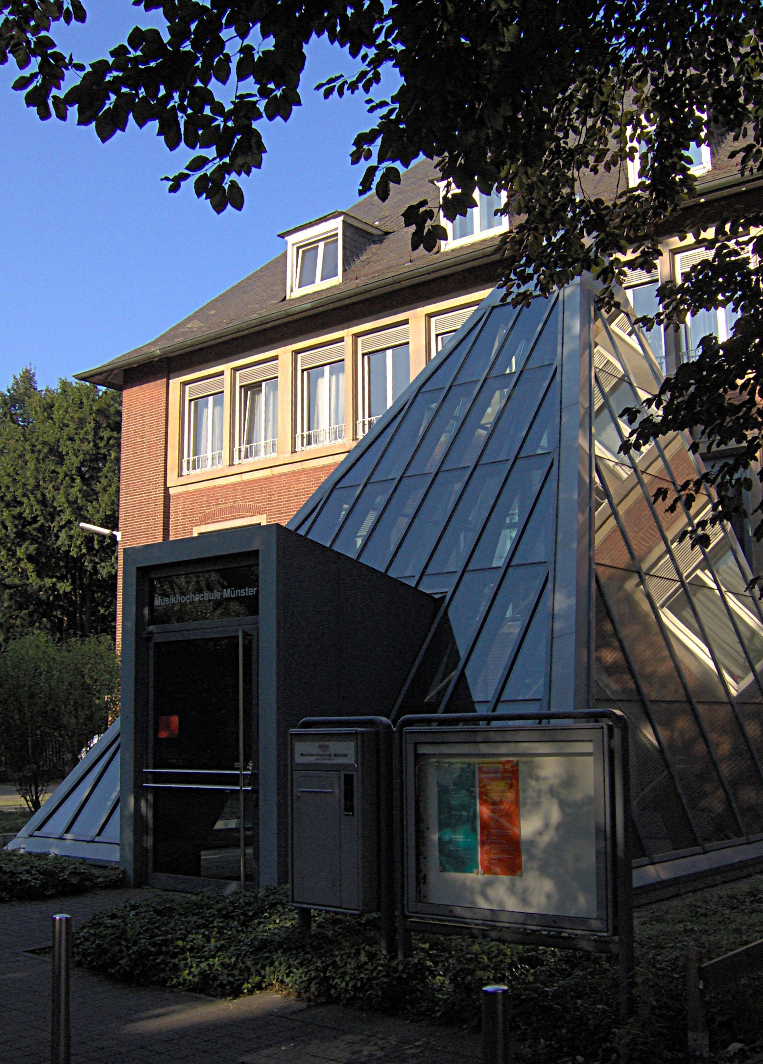 Musikhochschule Münster